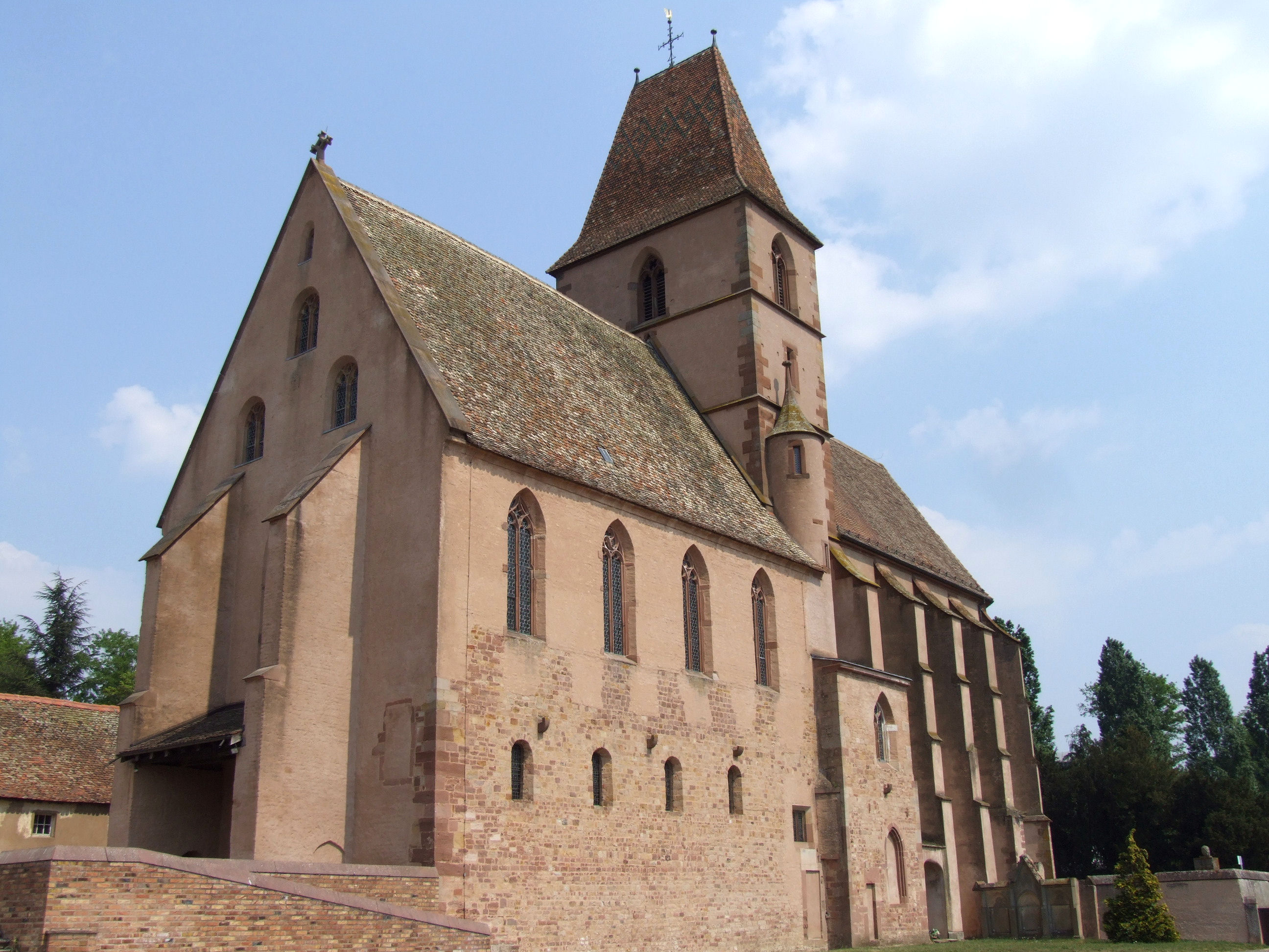 Walbourg - Eglise Sainte-Walburge - Ensemble